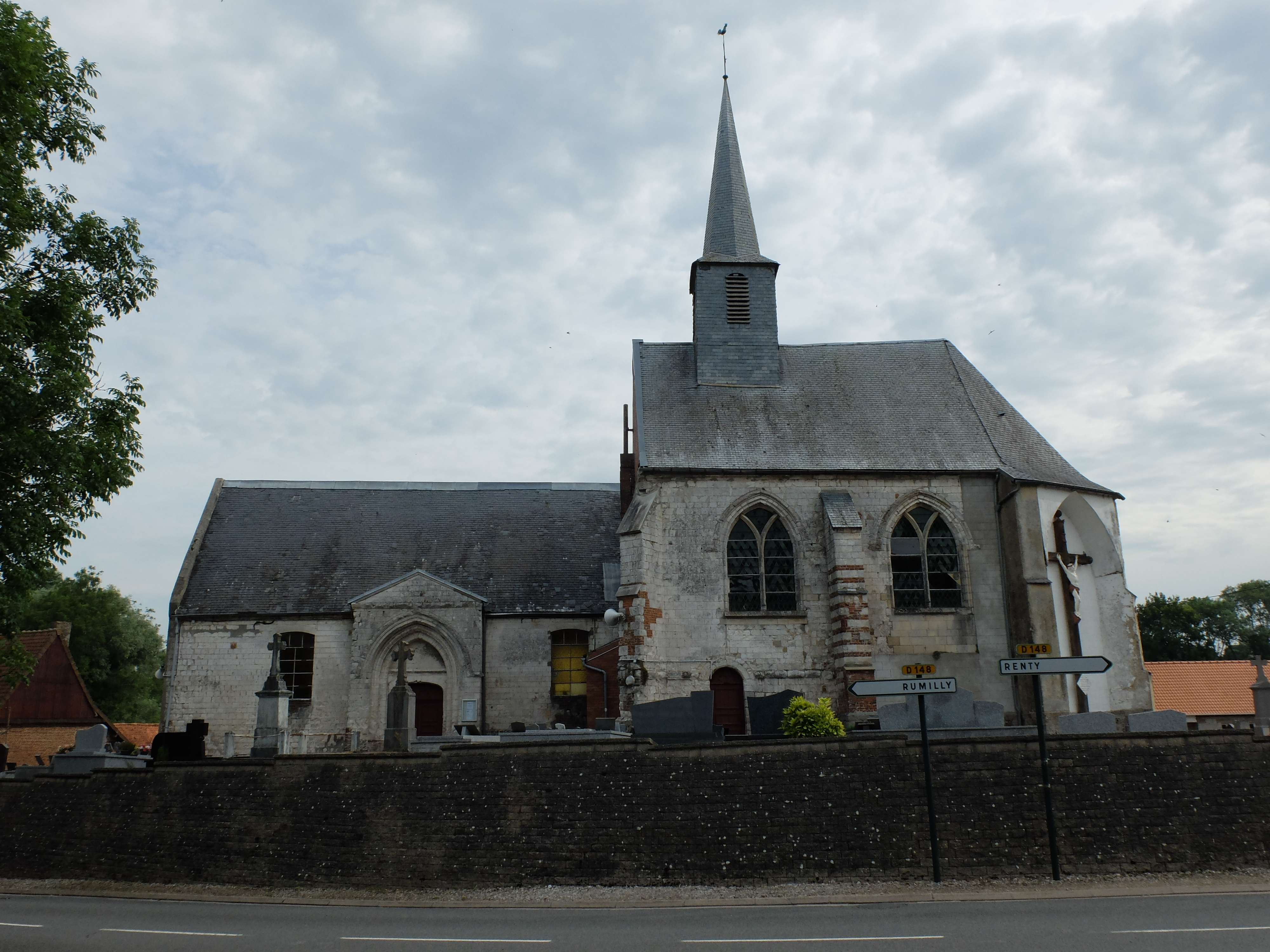 Vue de l'église Saint-Martin de Verchocq.